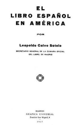 El libro español en América